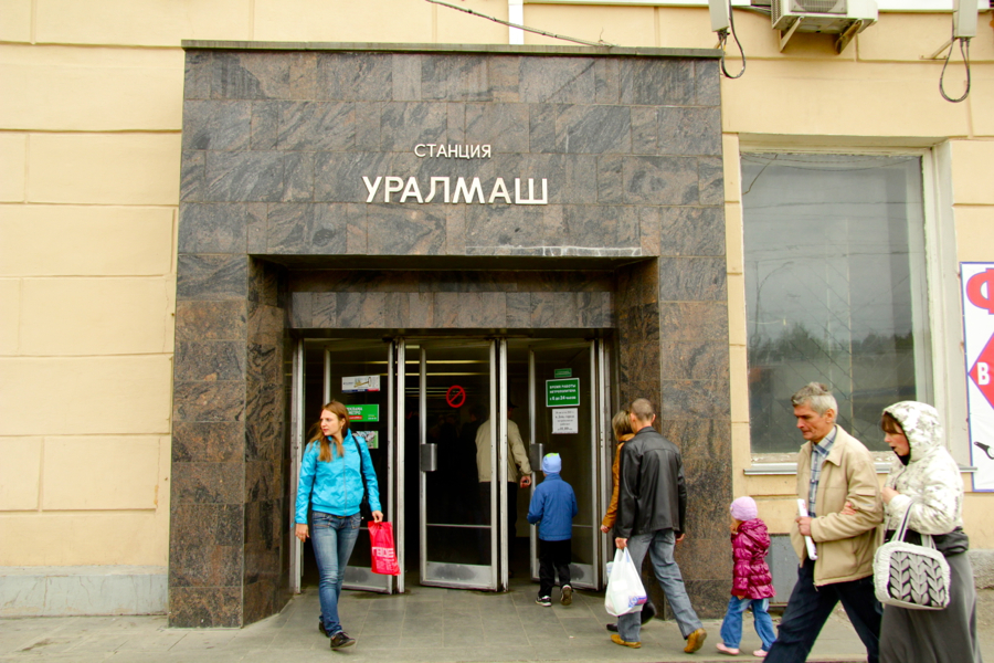 Yekaterinburg Metro (Екатеринбургский метрополитен)